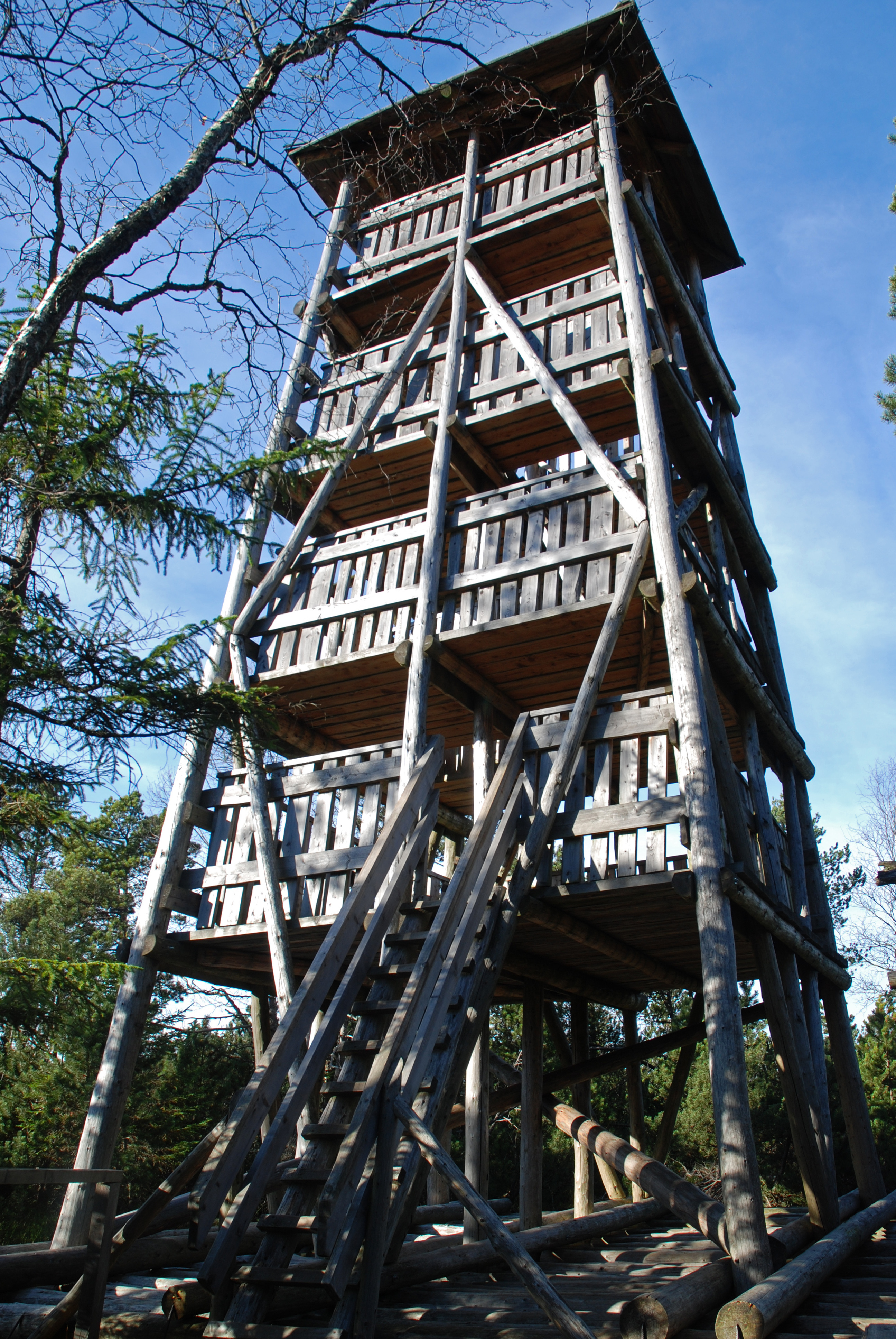 Beobachtungsturm (Vogelbeobachtuung) im Naturschutzgebiet Torfowisko pod Zieleńcem (früher „Reinerzer Seefelder“ oder „Die Seefelder“), Habelschwerdter Gebirge (Góry Bystrzyckie), Niederschlesien, Polen.